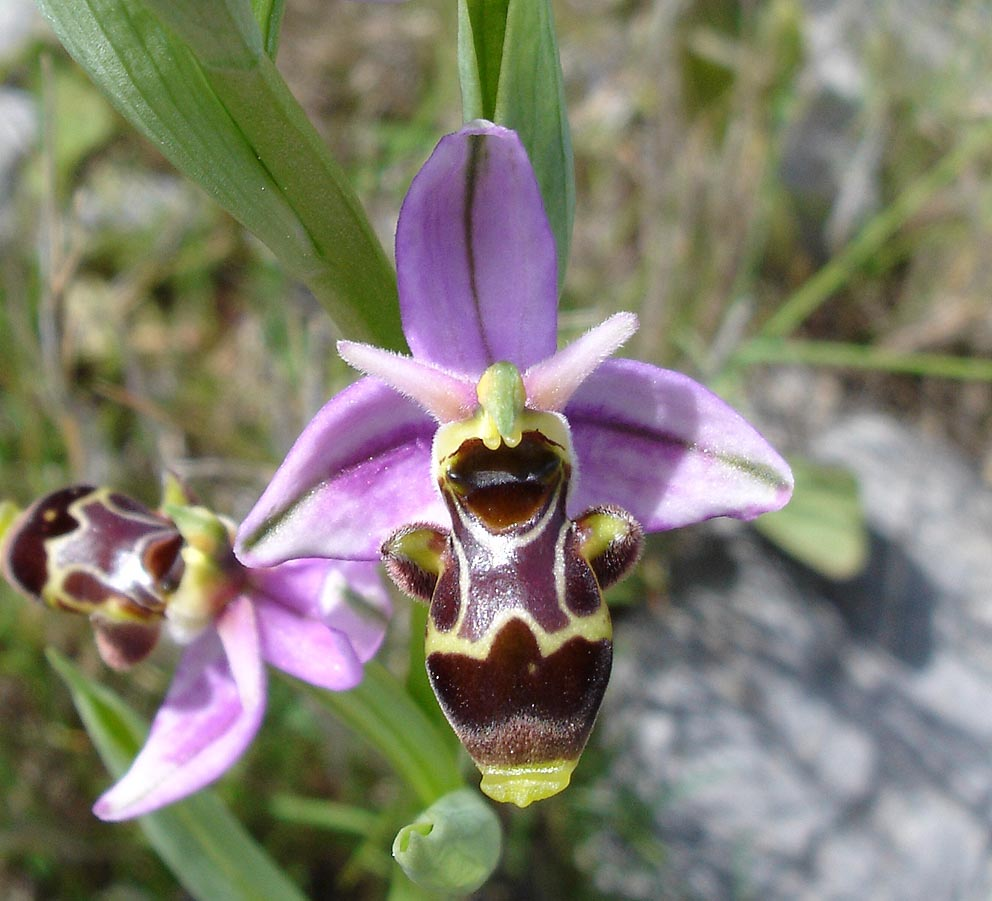 Ophrys scolopax à Opoul-Périllos (France, Roussillon)